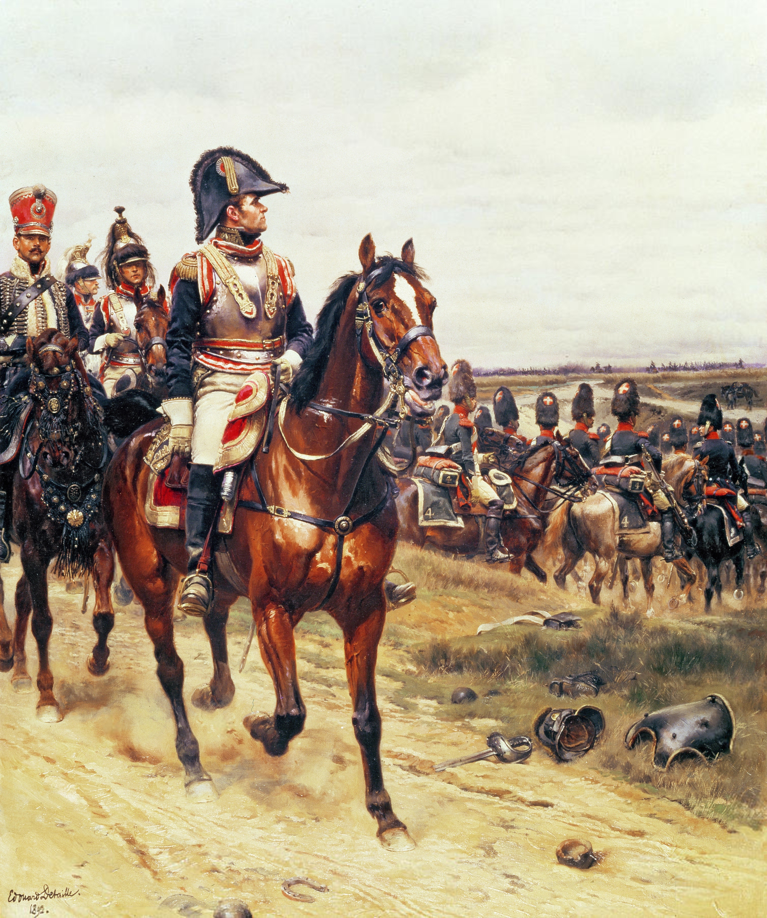 Édouard Detaille (1848–1912) Portrait du général Espagne à la bataille d'Heilsberg en 1807